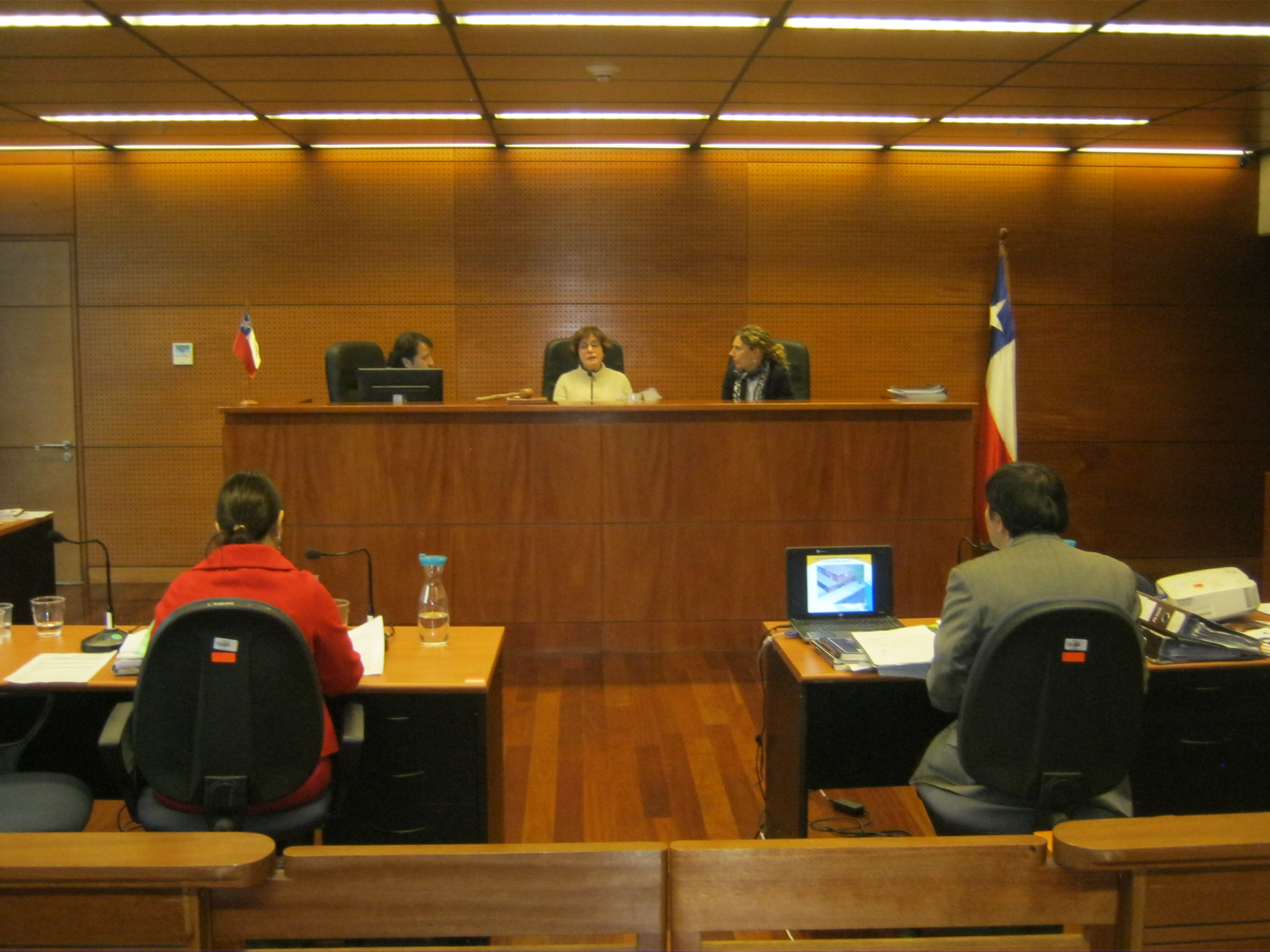 Tribunal de Juicio Oral en lo Penal de Chile